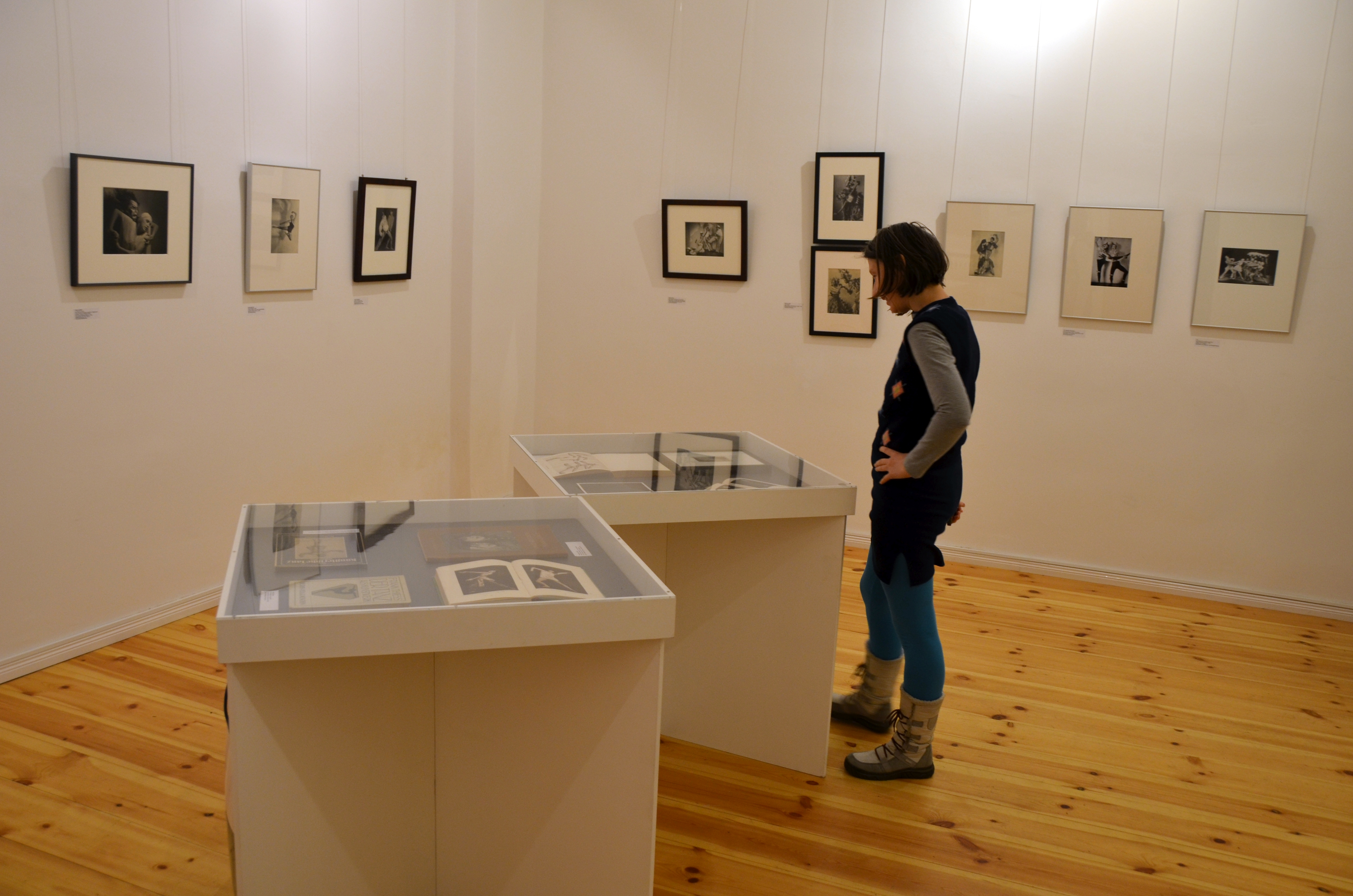 Ausstellungsraum in „Das Verborgene Museum“. Titel der Ausstellung: „Tanz der Hände“. Tilly Losch und Hedy Pfundmayr in Fotografien 1929-1935. (Vom 9.9.2015 bis 21.02.2016).